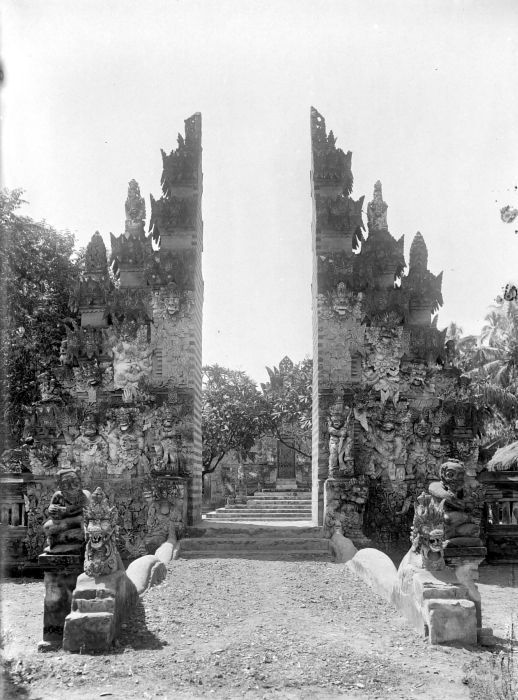 Negatief. Gespleten poort van de Pura Beji in Sangsit